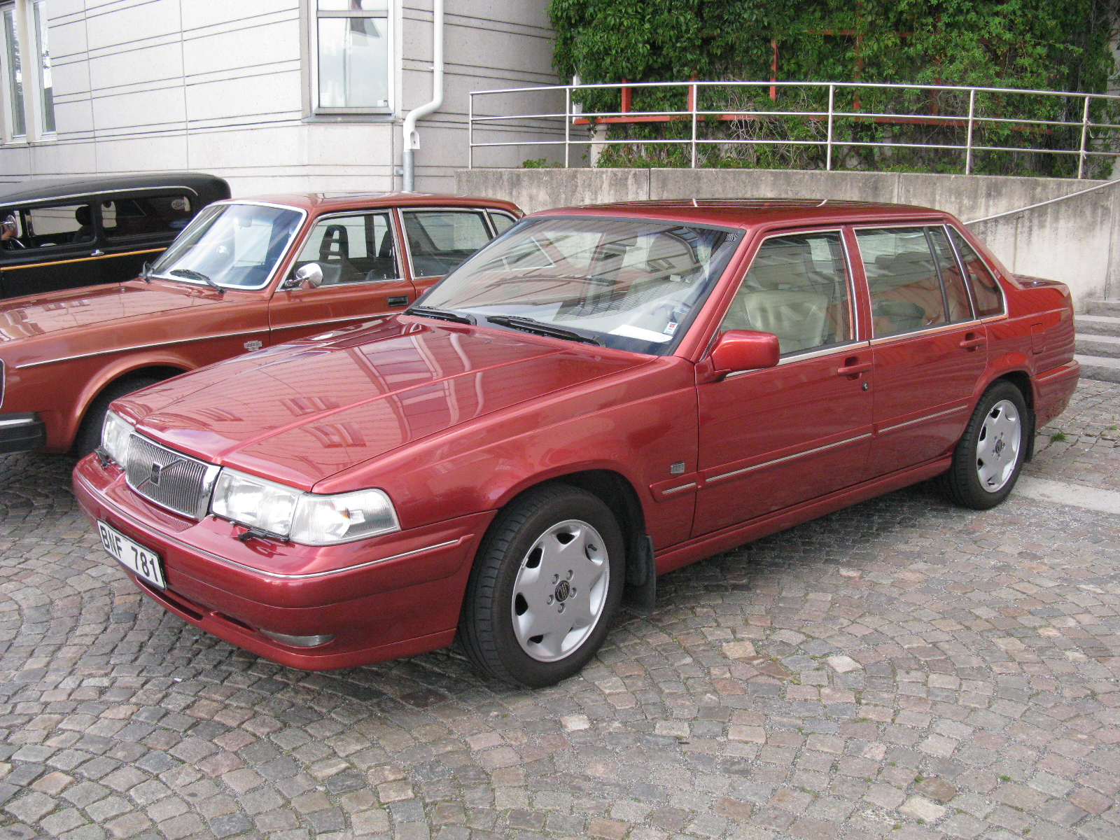 Volvo S90